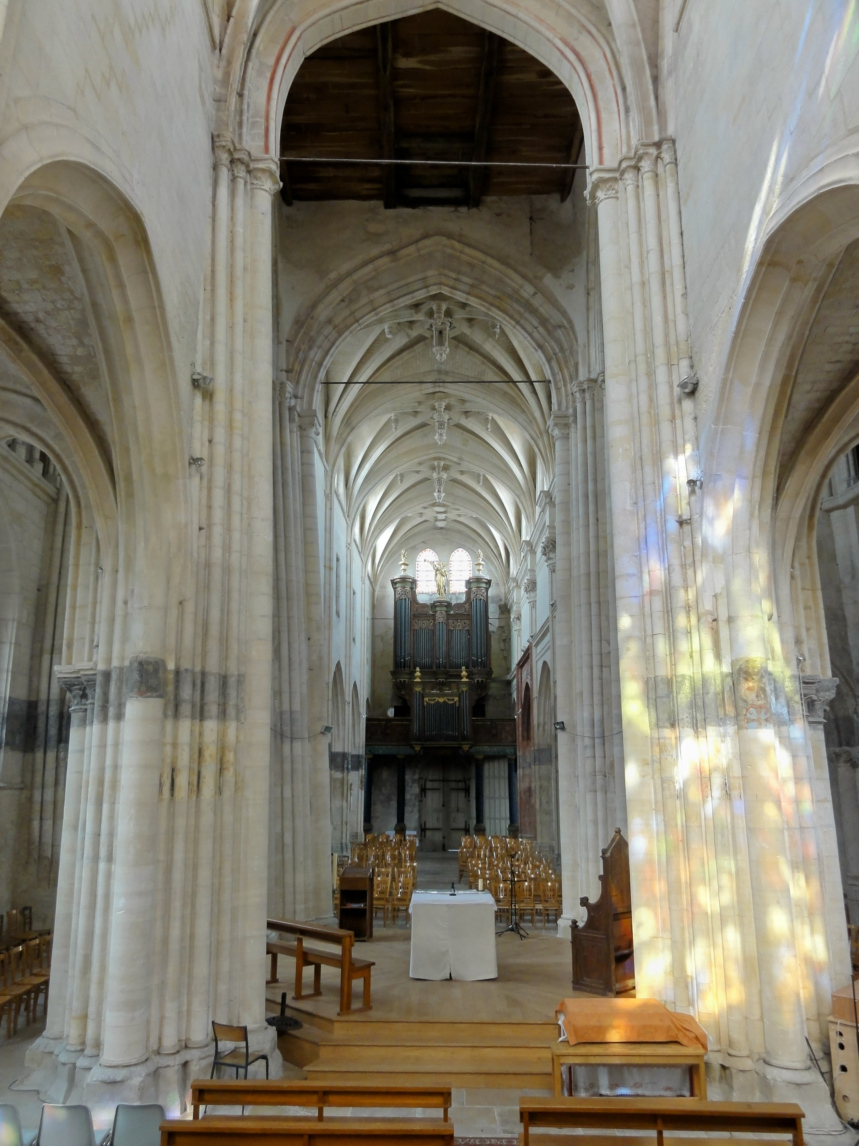 Vue générale intérieure depuis le chevet.